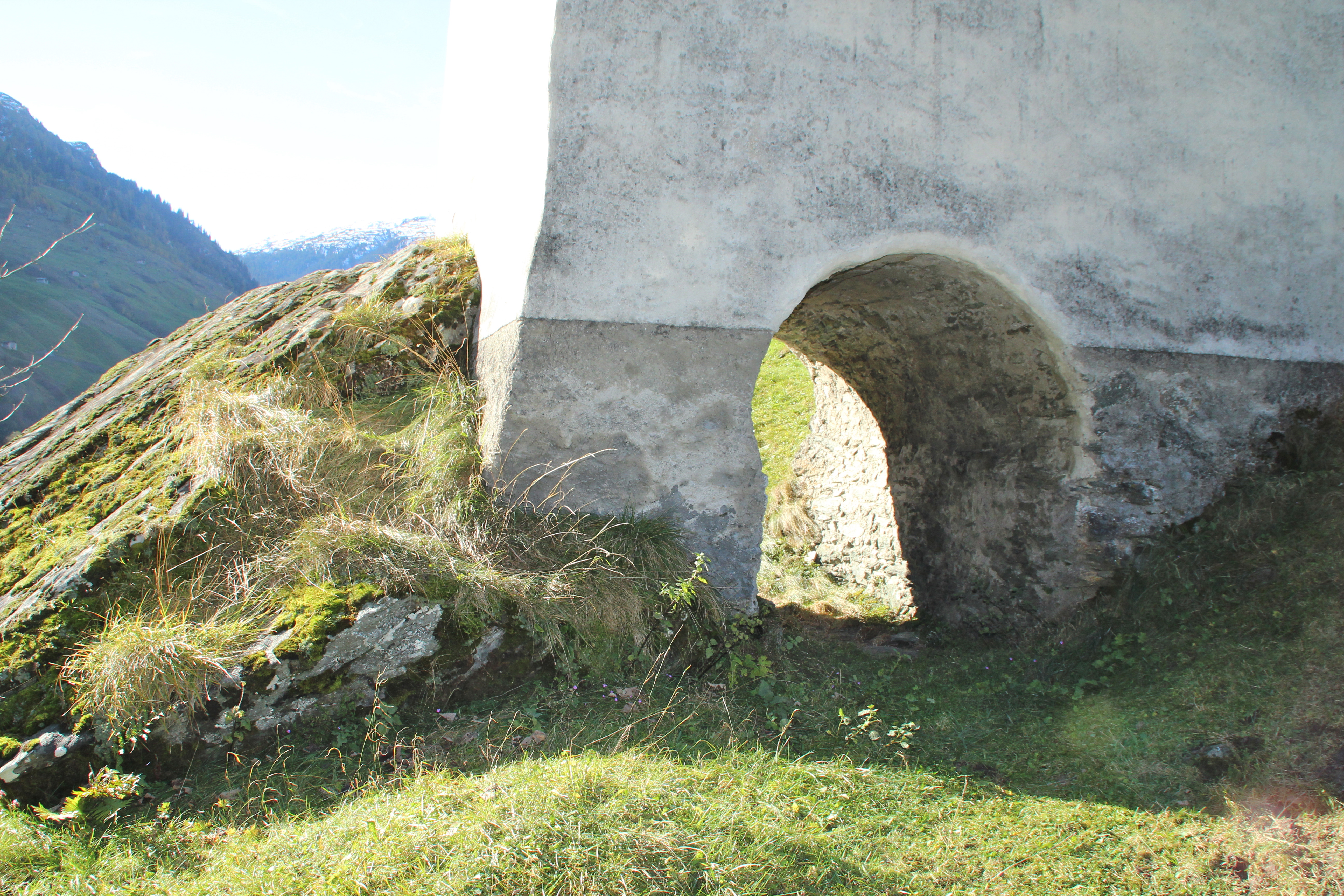 Kapelle St. Nikolaus (Vals)